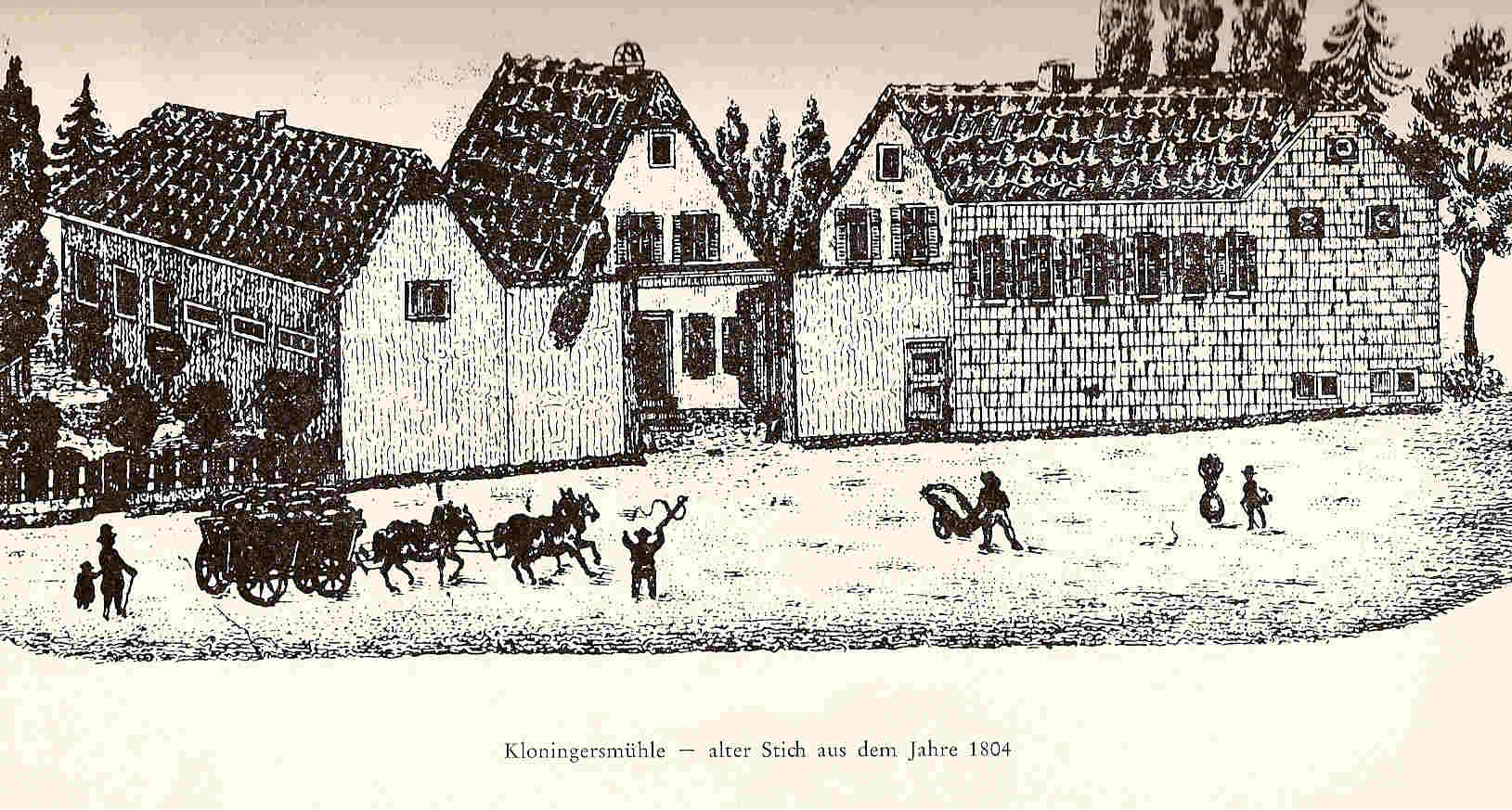 Stich von der Kloningersmühle um 1804